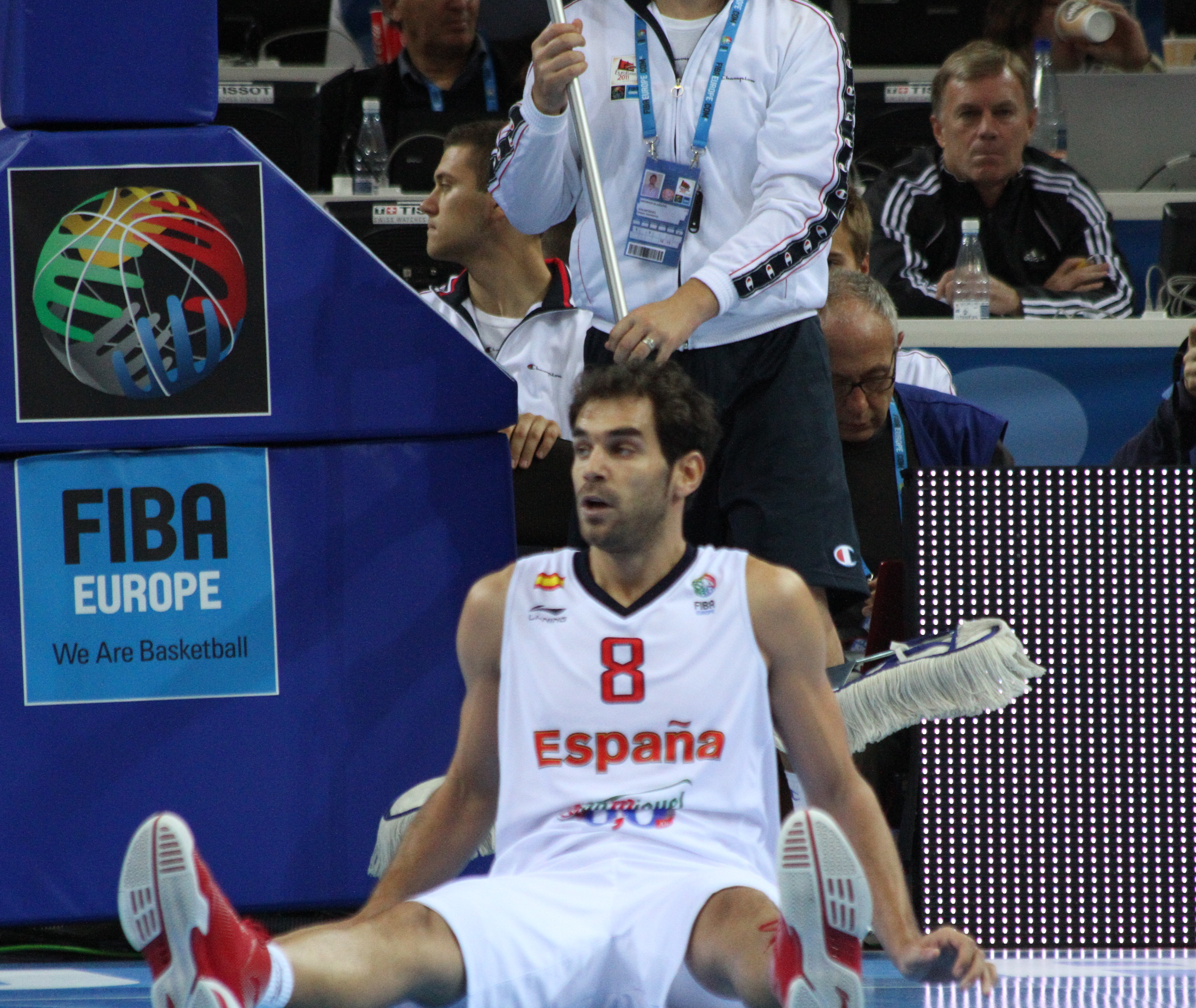 Jose Calderon at Eurobasket 2011.